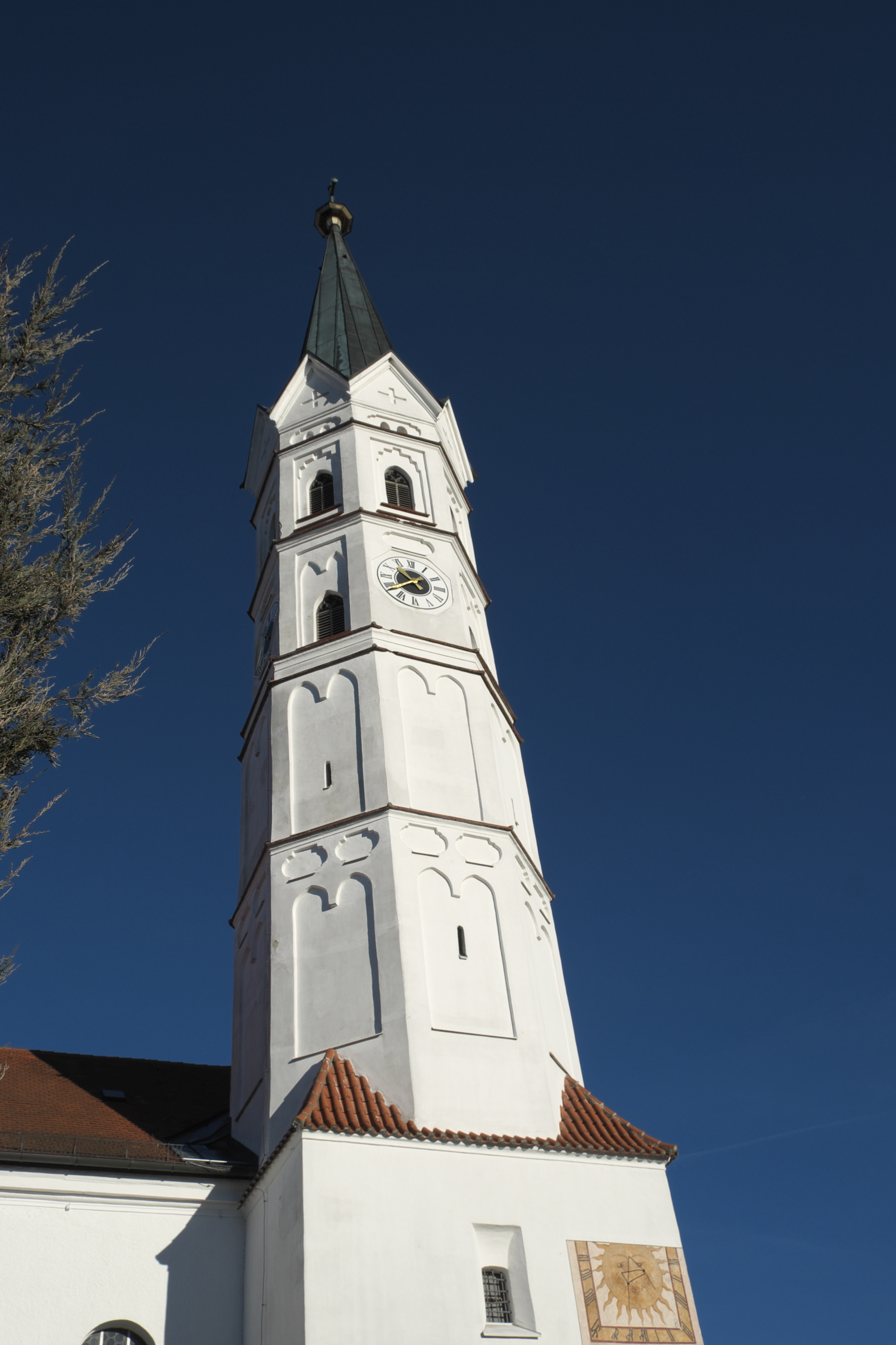 Katholische Pfarrkirche St. Johannes Evangelist in Hohenkammer im Landkreis Freising (Bayern/Deutschland), Kirchturm